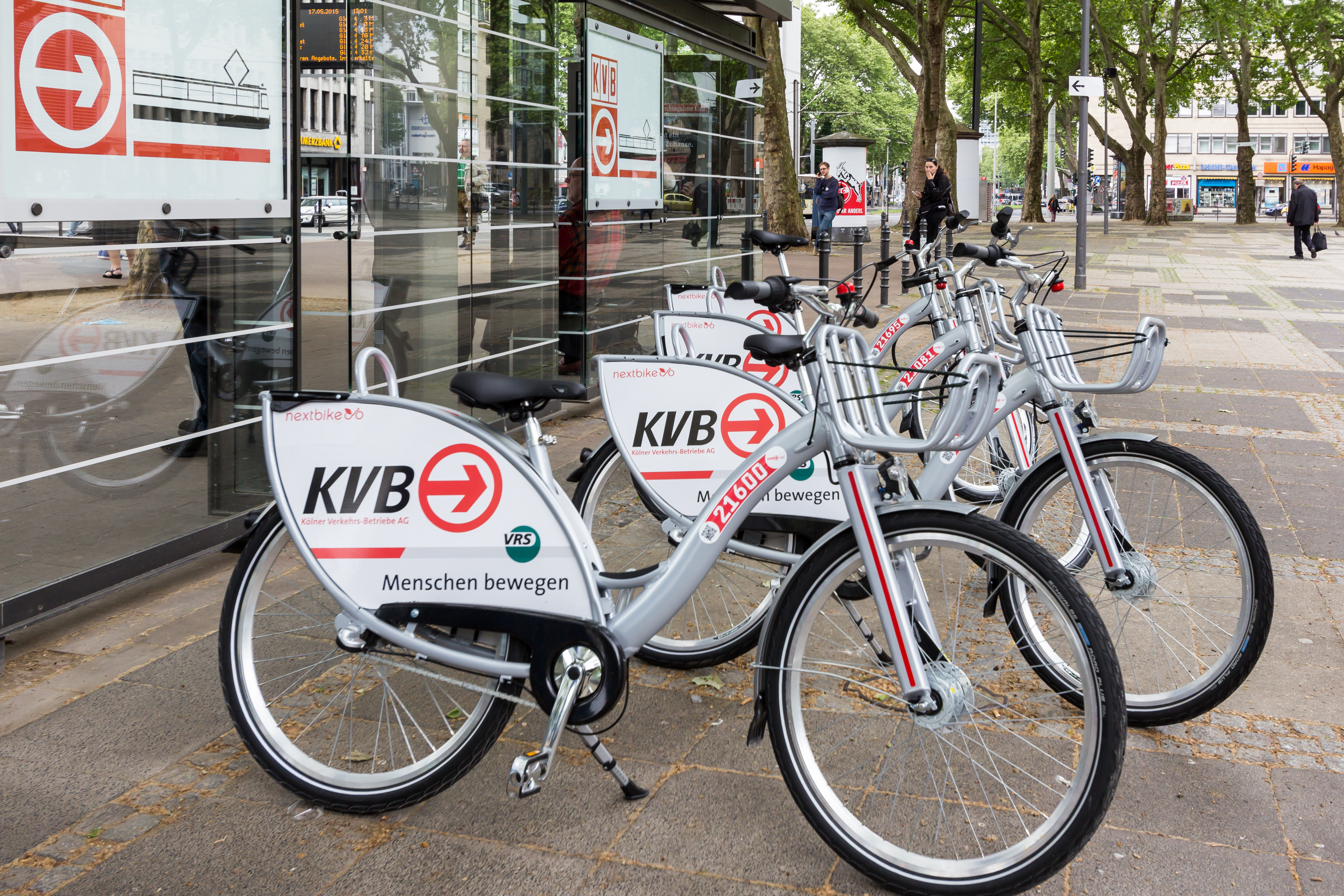 KVB-Rad - Mietfahrräder von nextbike am Neumarkt Köln